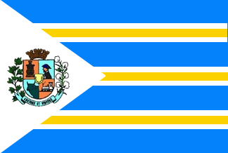 Bandeira de Glicério - SP - Brasil.